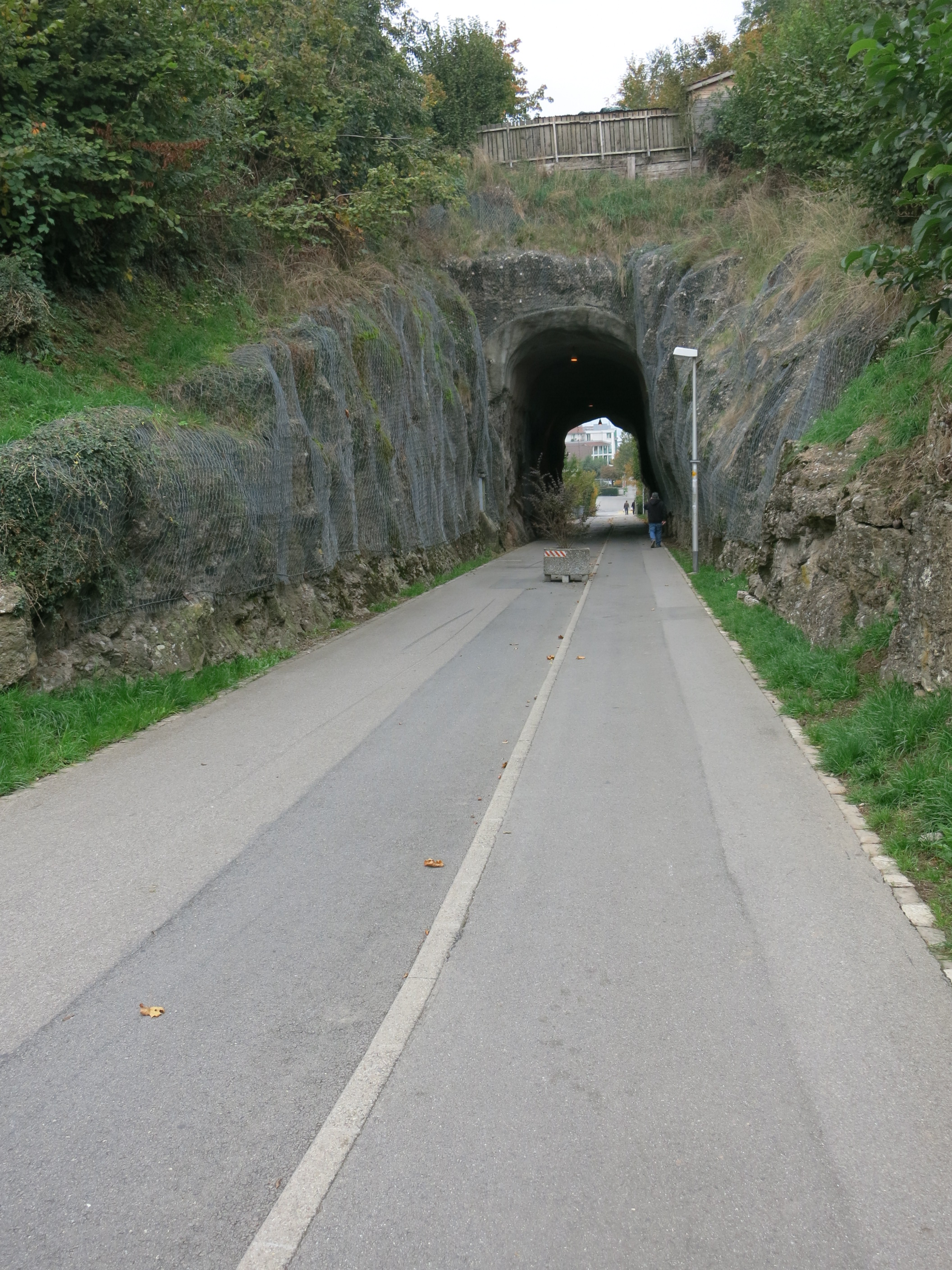 Mühlefluhtunnel Oberarth SZ, Schweiz